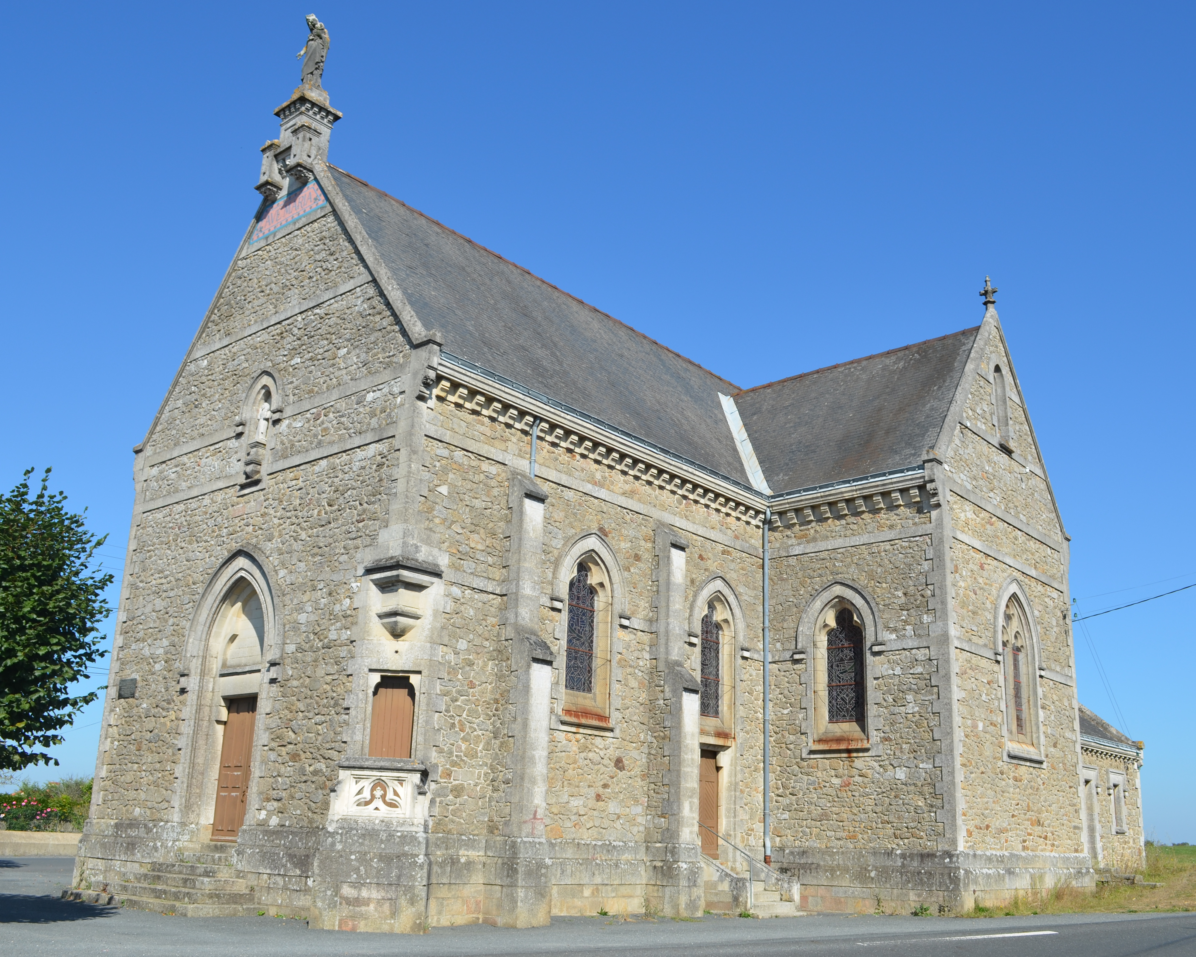 Chapelle Notre-Dame de Toutes Joies - Gétigné (Loire-Atlantique)